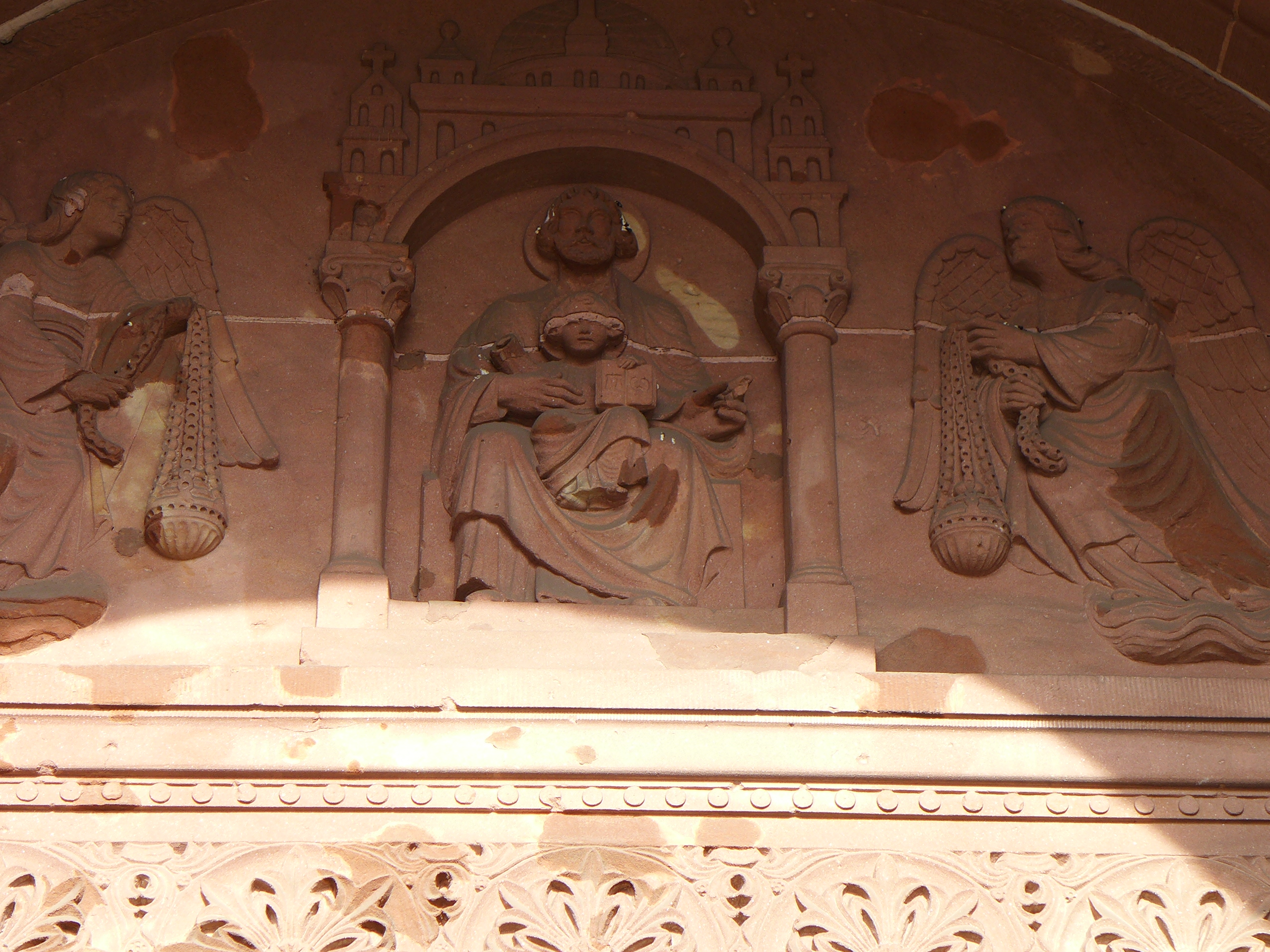 Saardom, Relief am Josefsportal